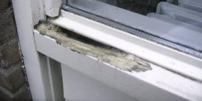 Foto van een kozijn met wit schilderwerk waar duidelijk houtrot te zien is.